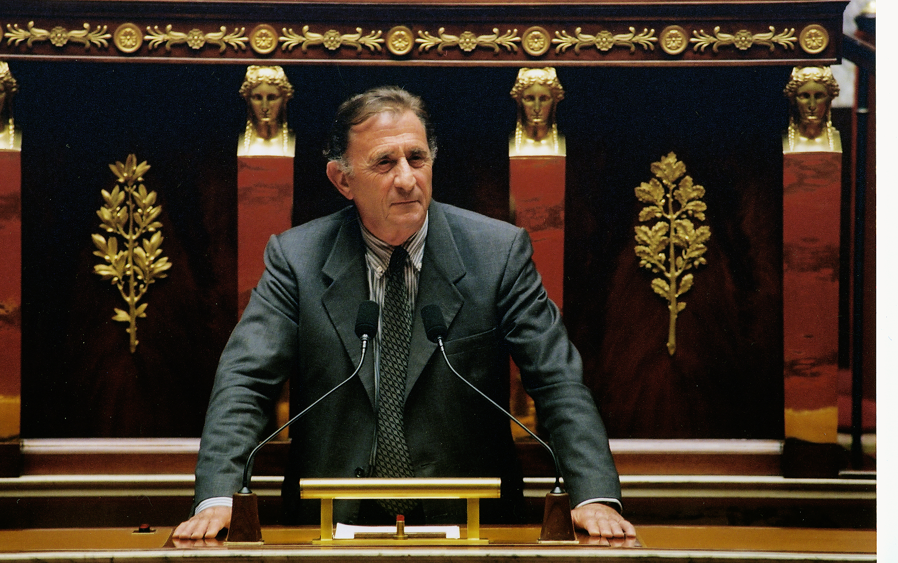 assemblée nationale